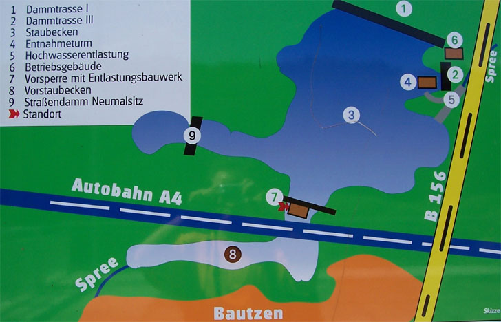 Foto Informationstafel zur Talsperre Bautzen am Vorstau Oehna